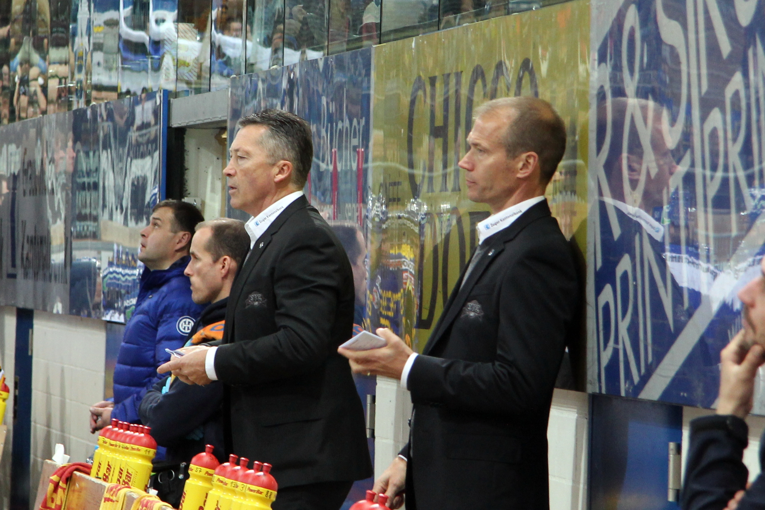 Harold Kreis (Z Head Coach), Waltteri Immonen (Z Assistant Coach).